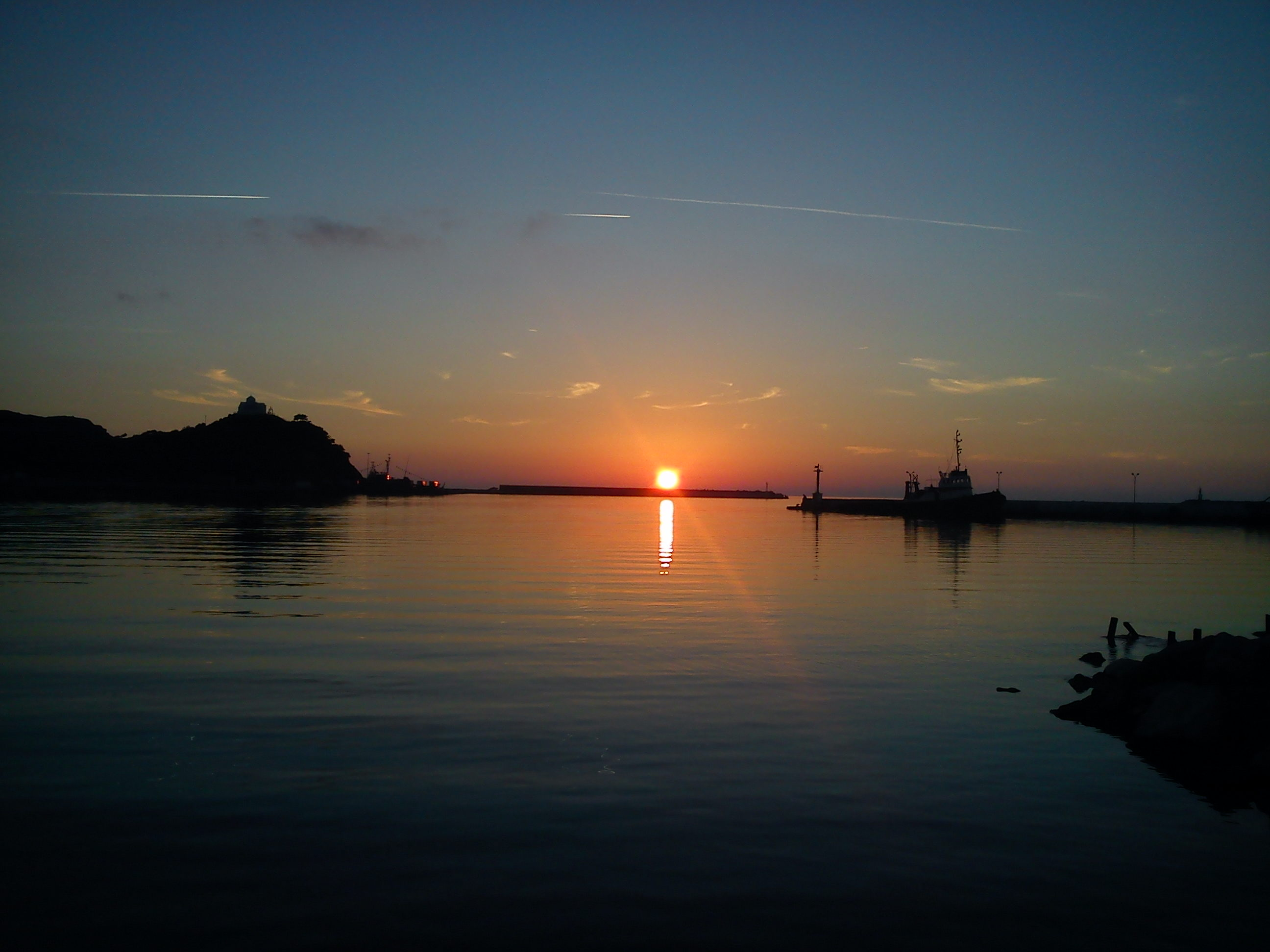 Δειλινό στο λιμάνι